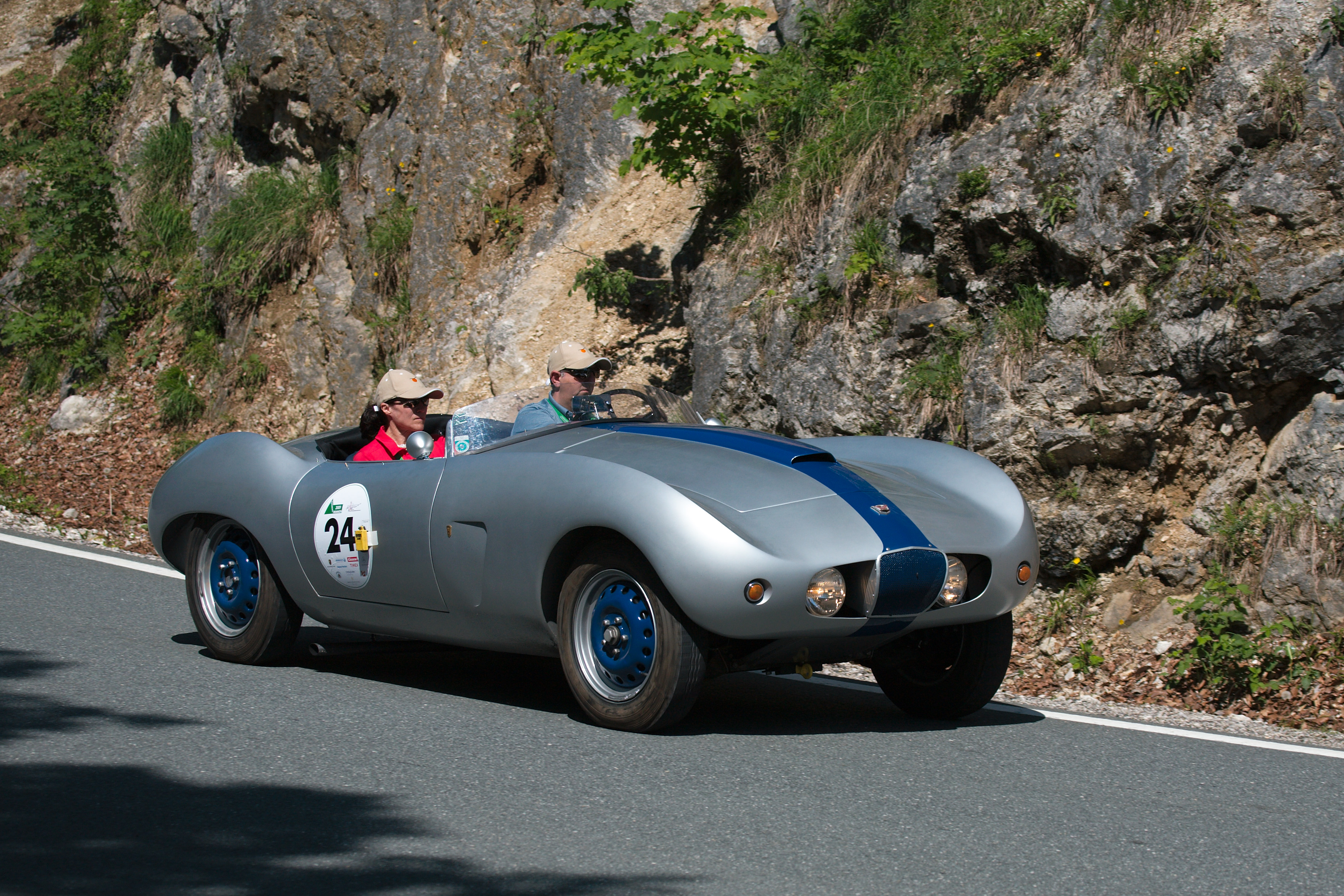 Arnolt Bristol (1952) at Gaisbergrennen 2009